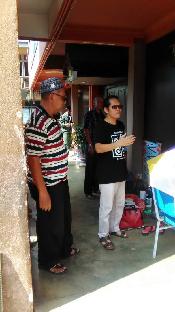 Tuan Haji Abbas Bin Haji Juki bersama Tuan Dr. Mohd. Azam Bin Ahmad, Pegawai Pendidikan Daerah Jasin